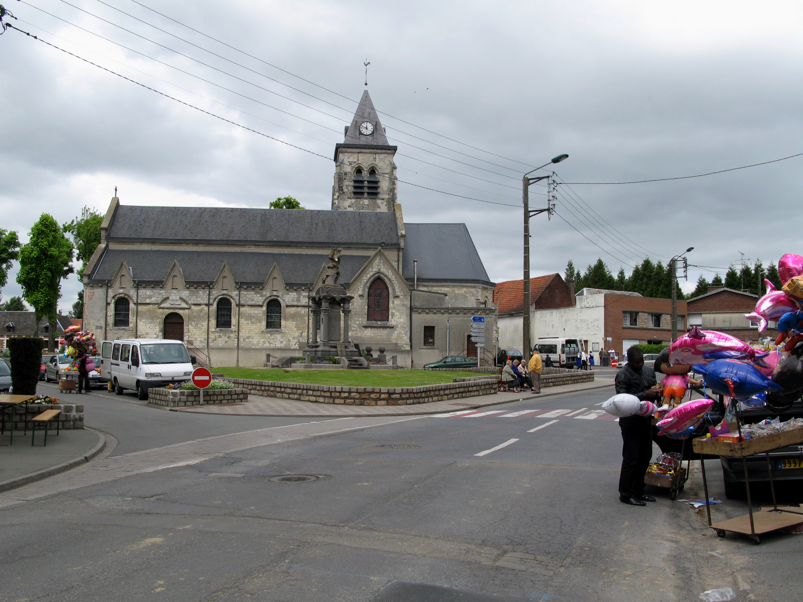 Villers-Outréaux (Nord, France) - Animation festive au centre-ville, un dimanche de printemps. Des petits vendeurs ambulants de ballons et gadgets se positionnent autour de l'église et du monument aux morts en attendant le passage du public pour le départ de la parade des géants, de l'autre côté de l'église. .